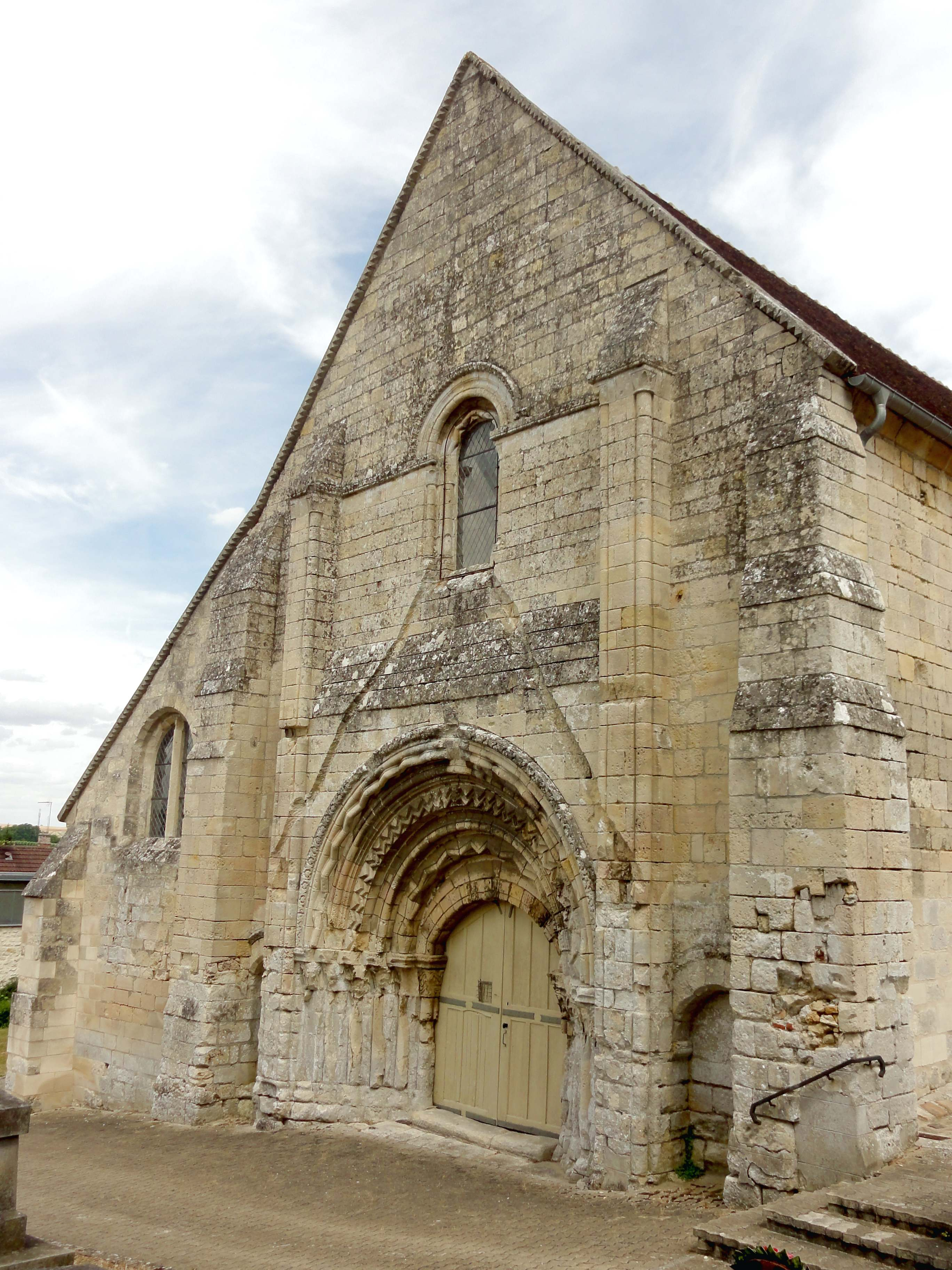 Église Saint-Michel-et-Saint-Vaast de Catenoy (voir titre).